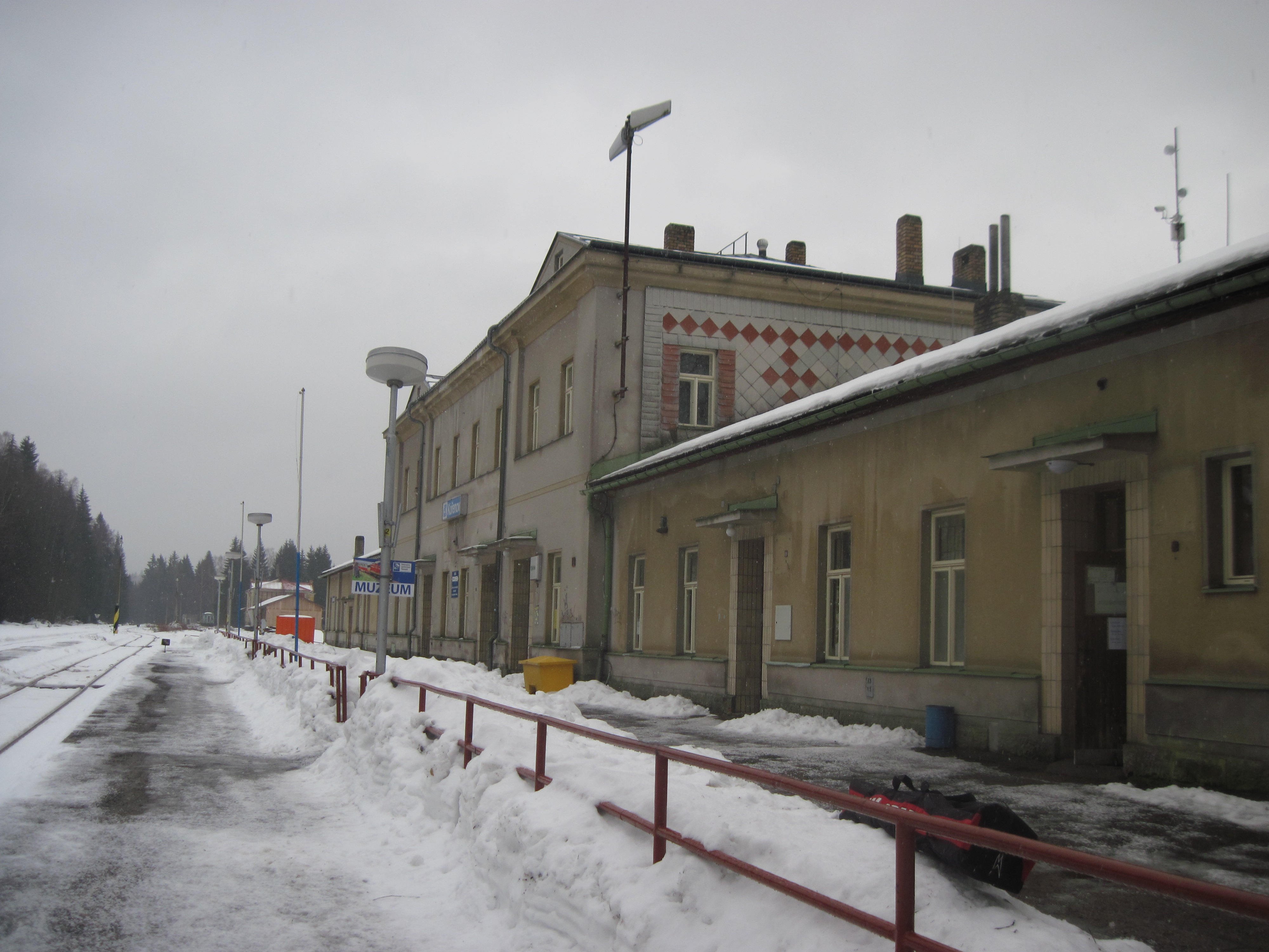 železniční stanice Kořenov